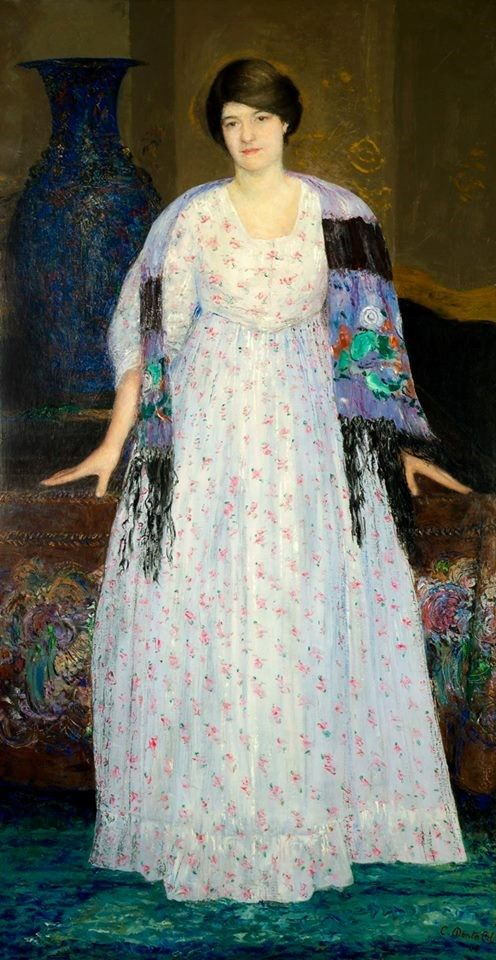 Portrait de Madame Constant Montald